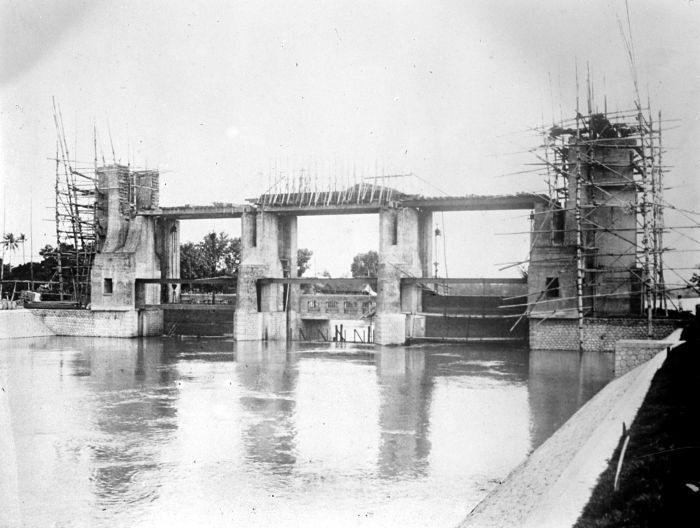 Repronegatief. Spuisluis Wonokromo-kanaal in aanbouw te Soerabaja, Java